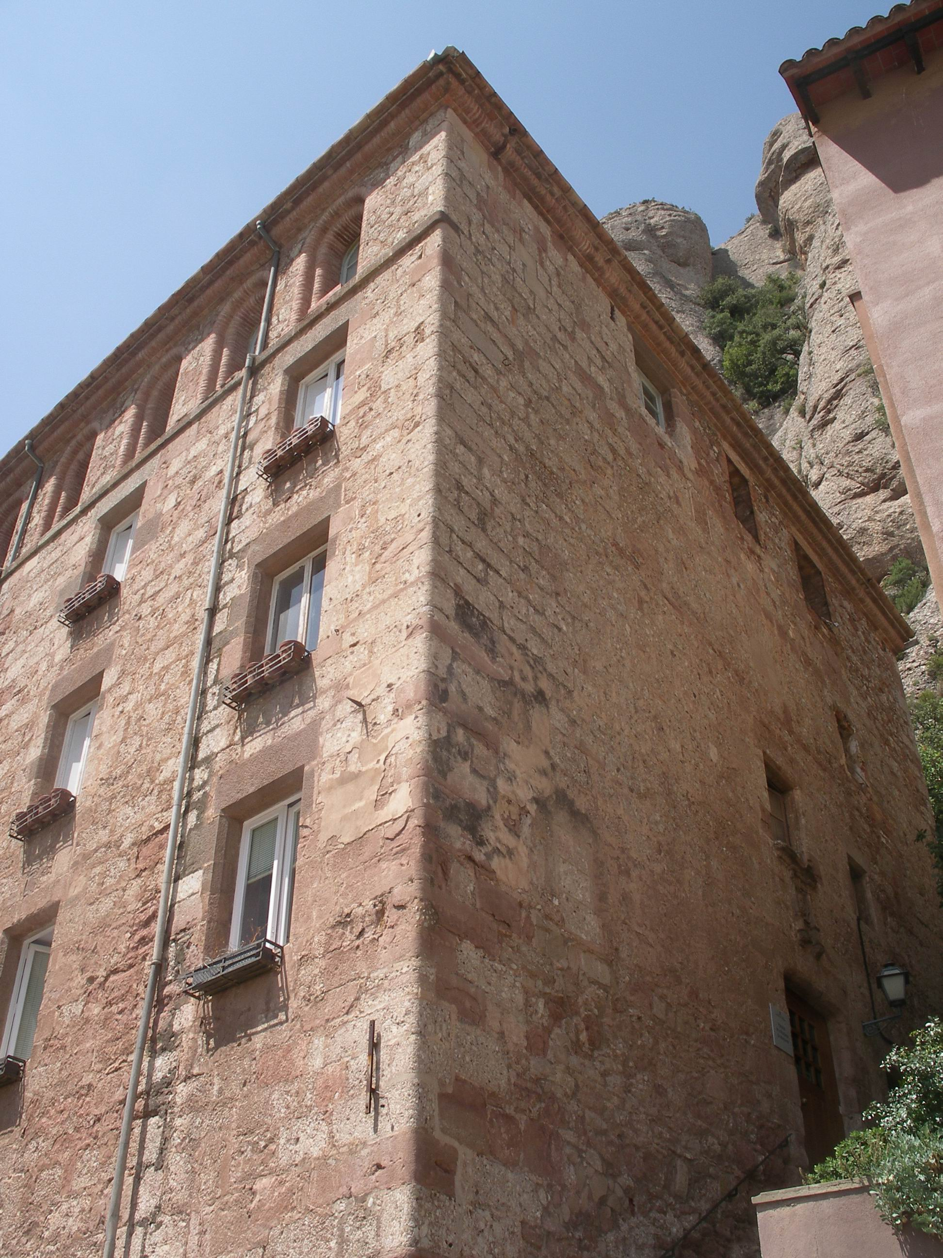 Edifici dels llecs, a l'abadia de Montserrat, avui amb cel·les i la seu del Patronat de la muntanya. Edifici del s. XVII